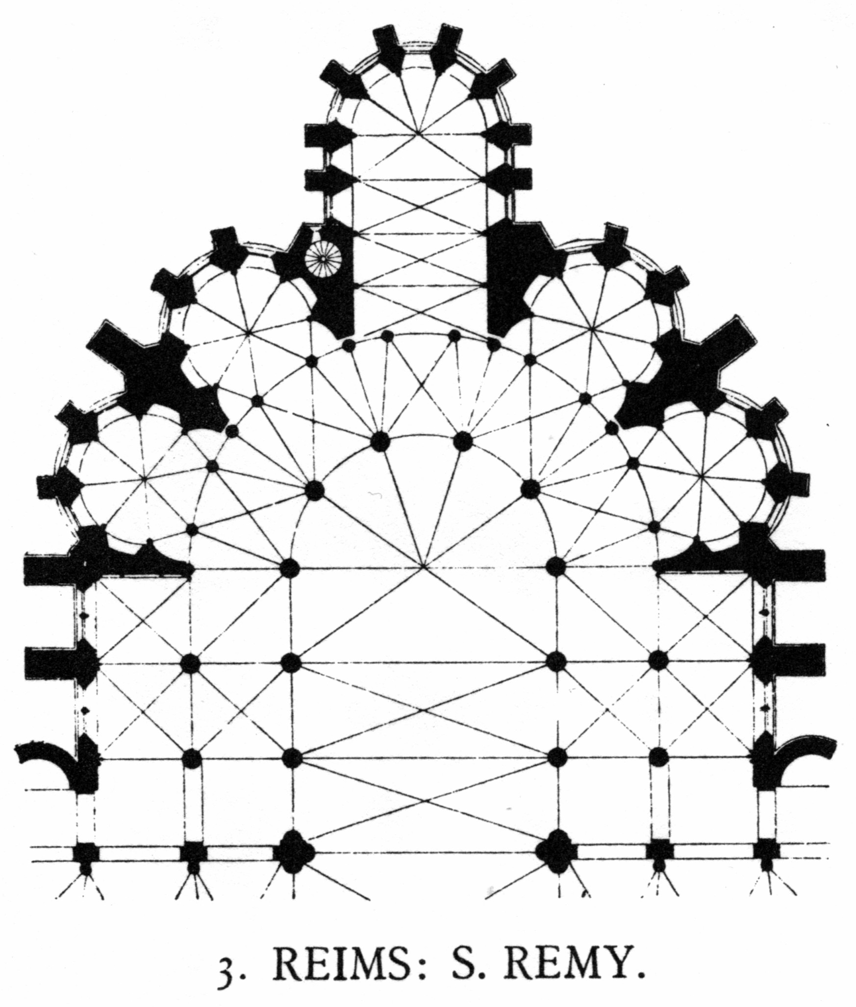 Reims, S. Remy